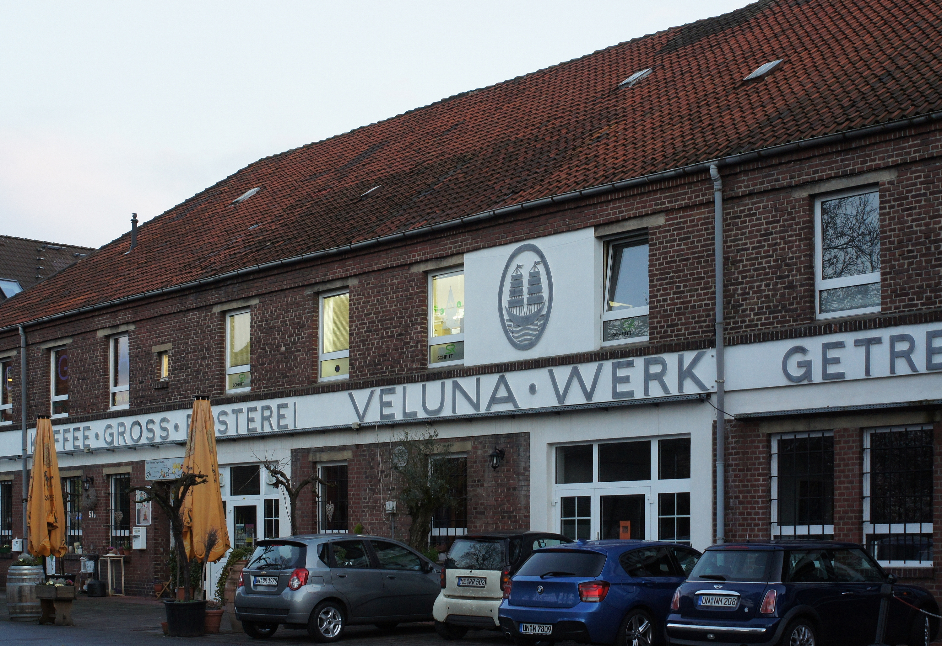 Alte Kafferösterei an der Cappenberger Straße in Lünen. Route der Industriekultur.